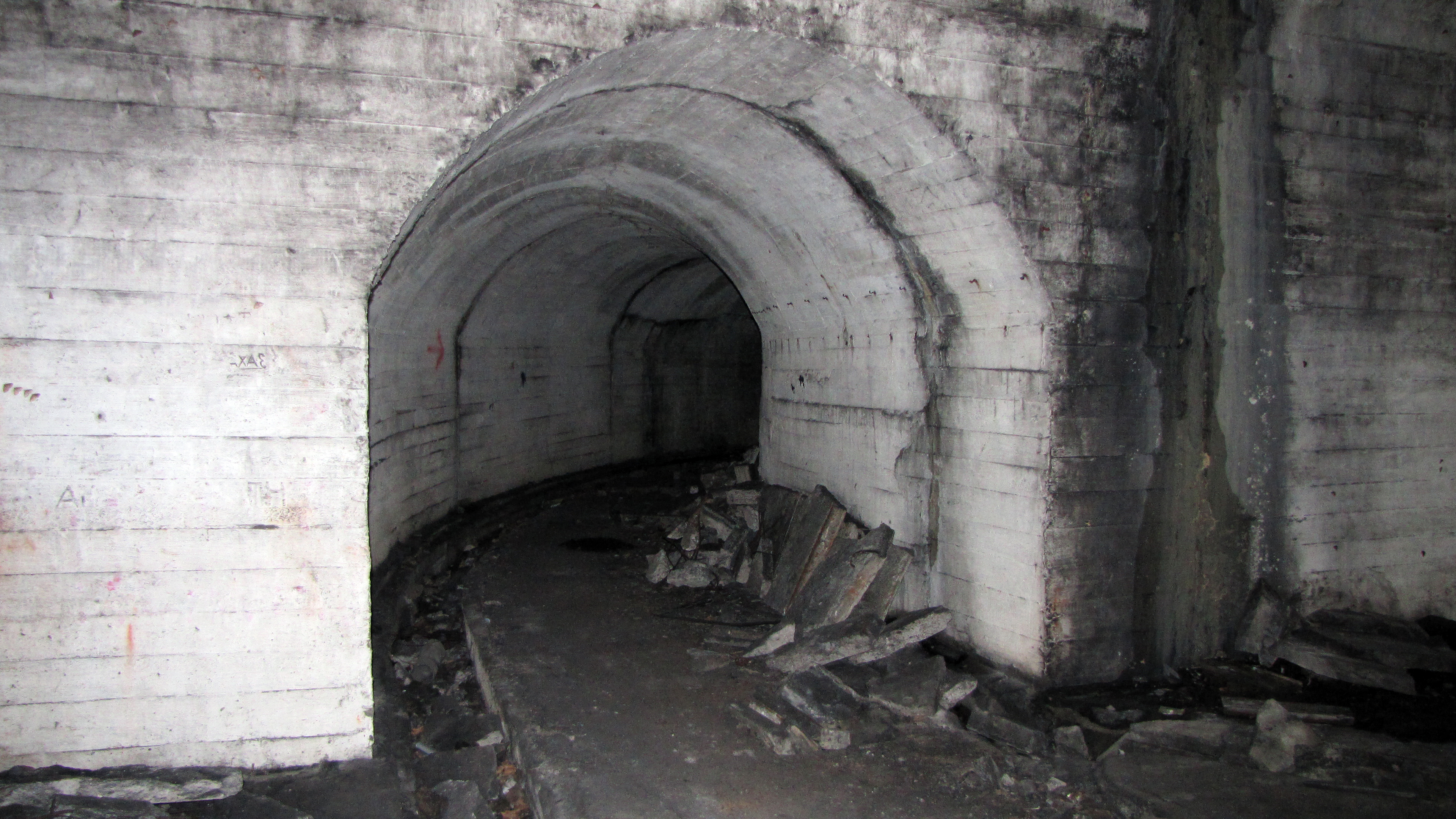 Peeter Suure merekindluse laskemoonalaod (ladu IV), 1917. a, Astangu